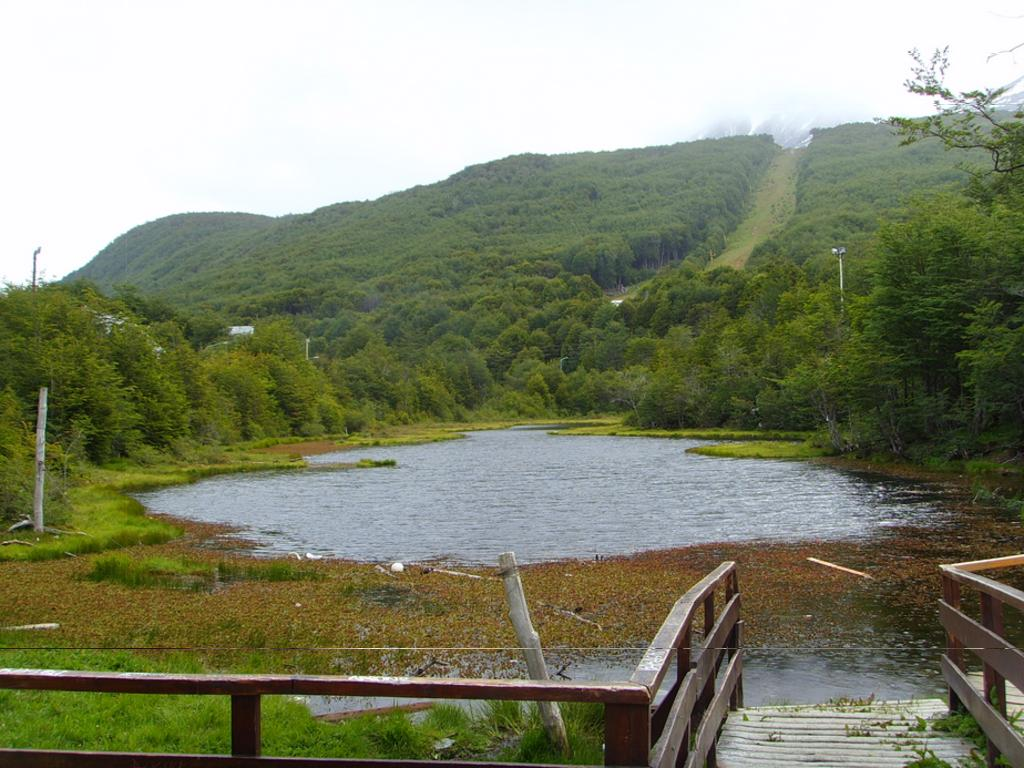 Laguna del Diablo and Club Andino, Ushuaia, Argentina